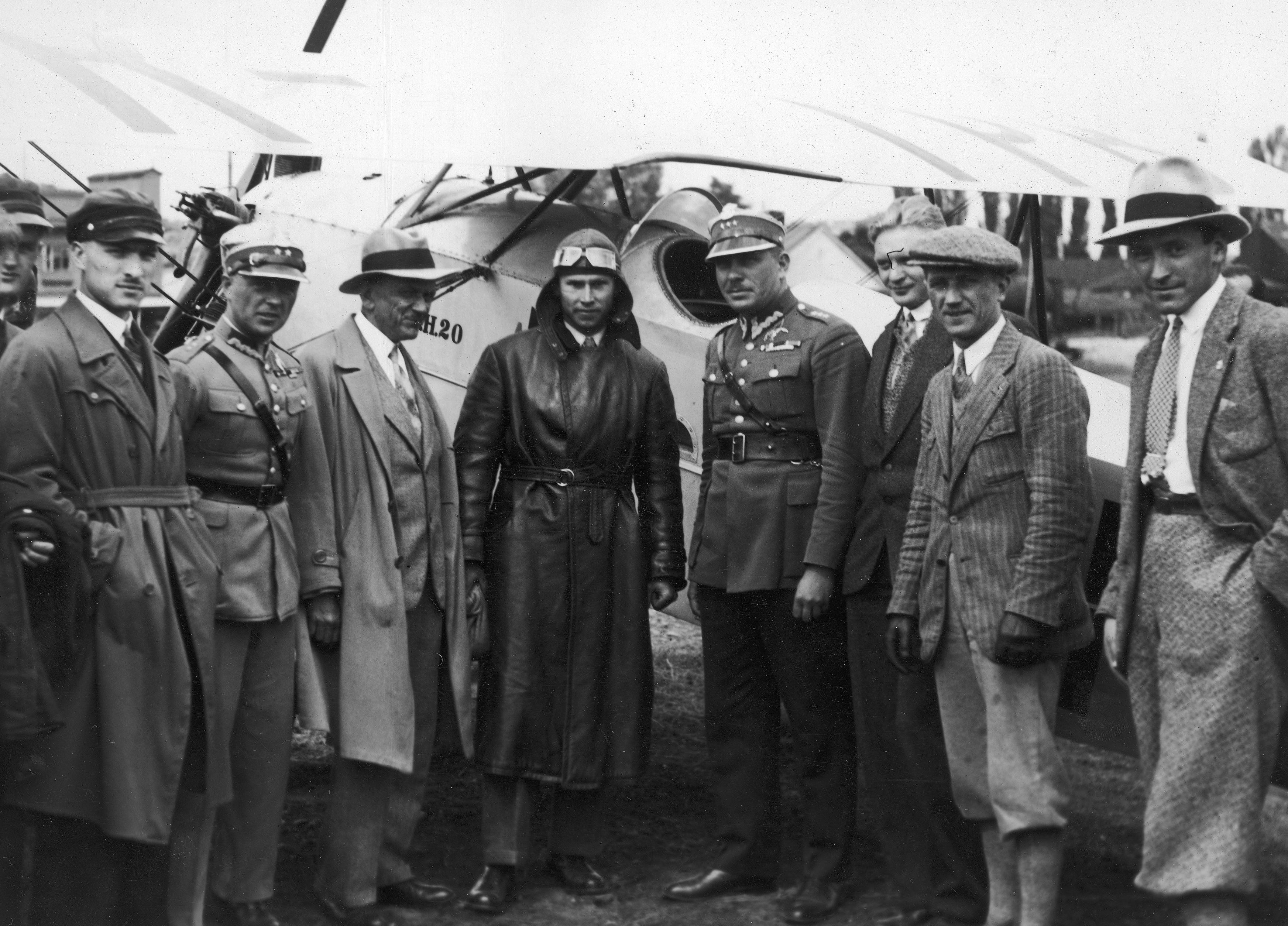 Zahájení soutěže. Na snímku mimo jiné: československý pilot Ing. Vladimir Šimůnek (v koženém kabátě) Avia BH-20, vpravo od něj kapitán Tadeusz Halewski a režisér Bereza.